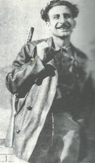 Antonio Ortiz sur le front d’Aragon en 1936.